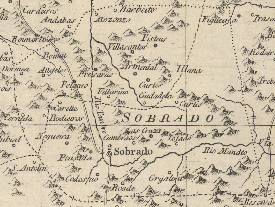 Arciprestado de Sobrado no mapa do arcebispado de Santiago de Compostela realizado por Angel Marin, cura de S. Salvador de Poio.